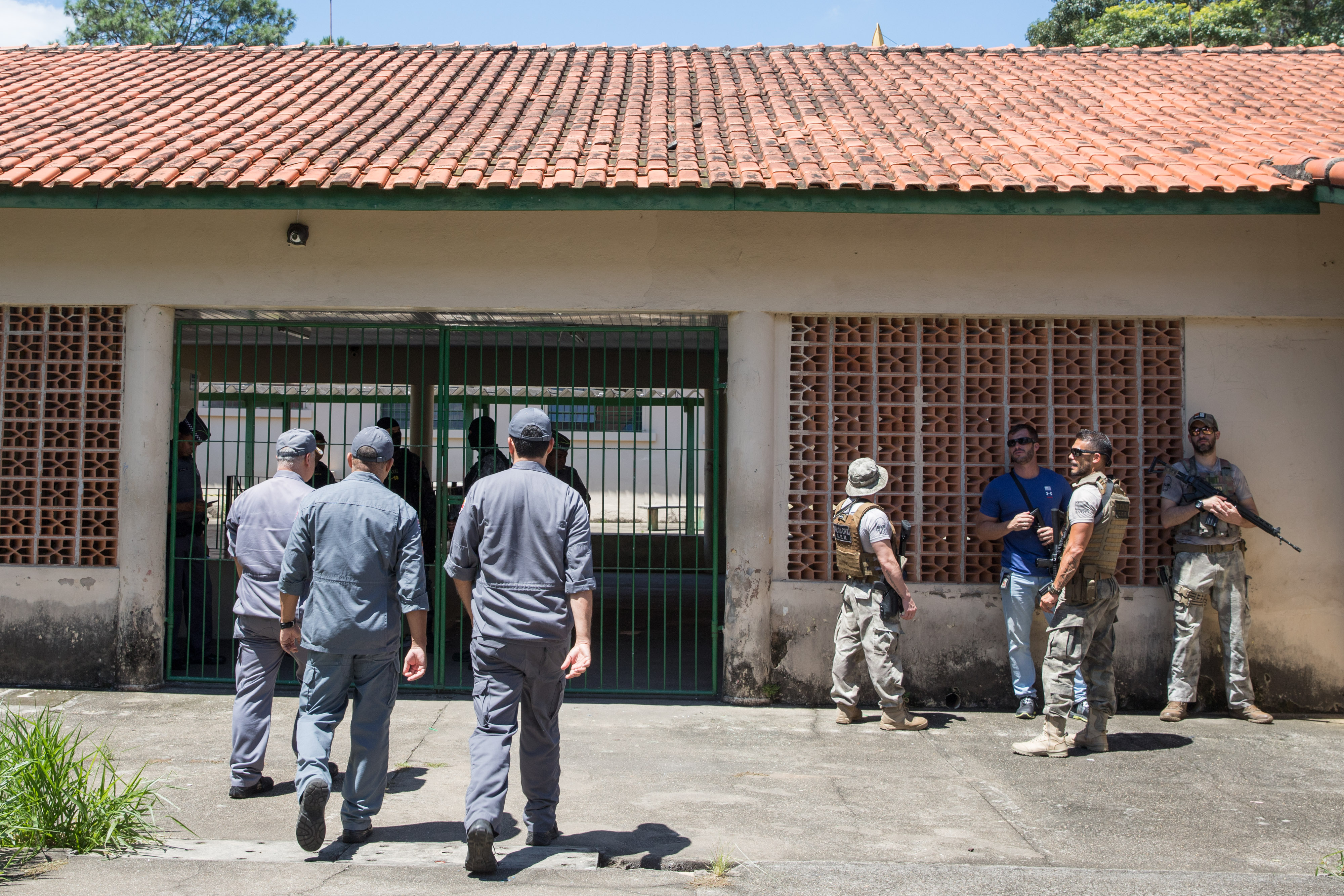 Secretários da Segurança Pública, participam de coletiva de imprensa na Escola Raul Brasil. Local: São Paulo/SP.Data: 13/03/2019 Foto: Governo do Estado de São Paulo